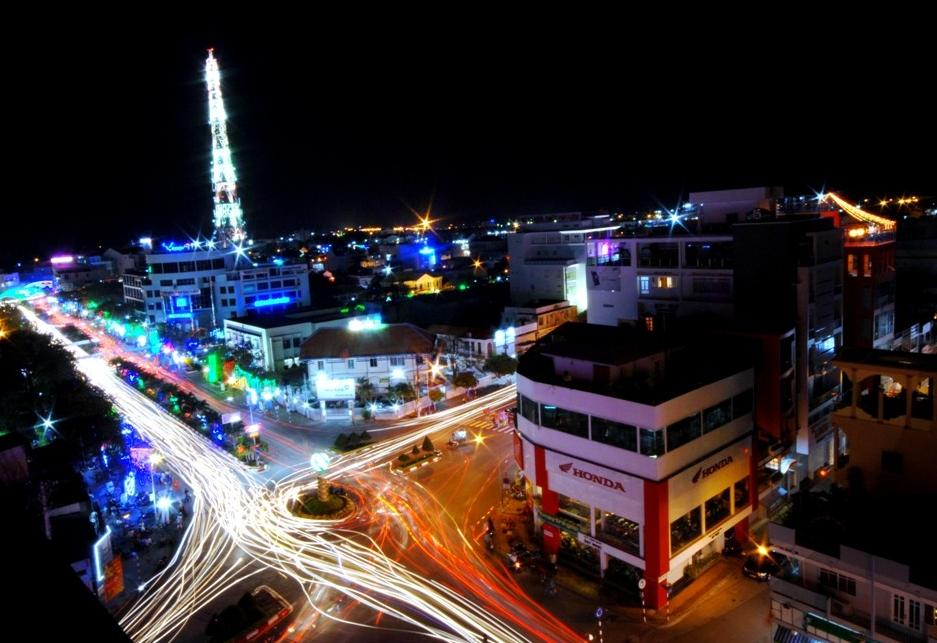 đường phố Bạc Liêu